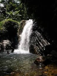 සිංහල: ගෝනගමුව දිය ඇල්ල